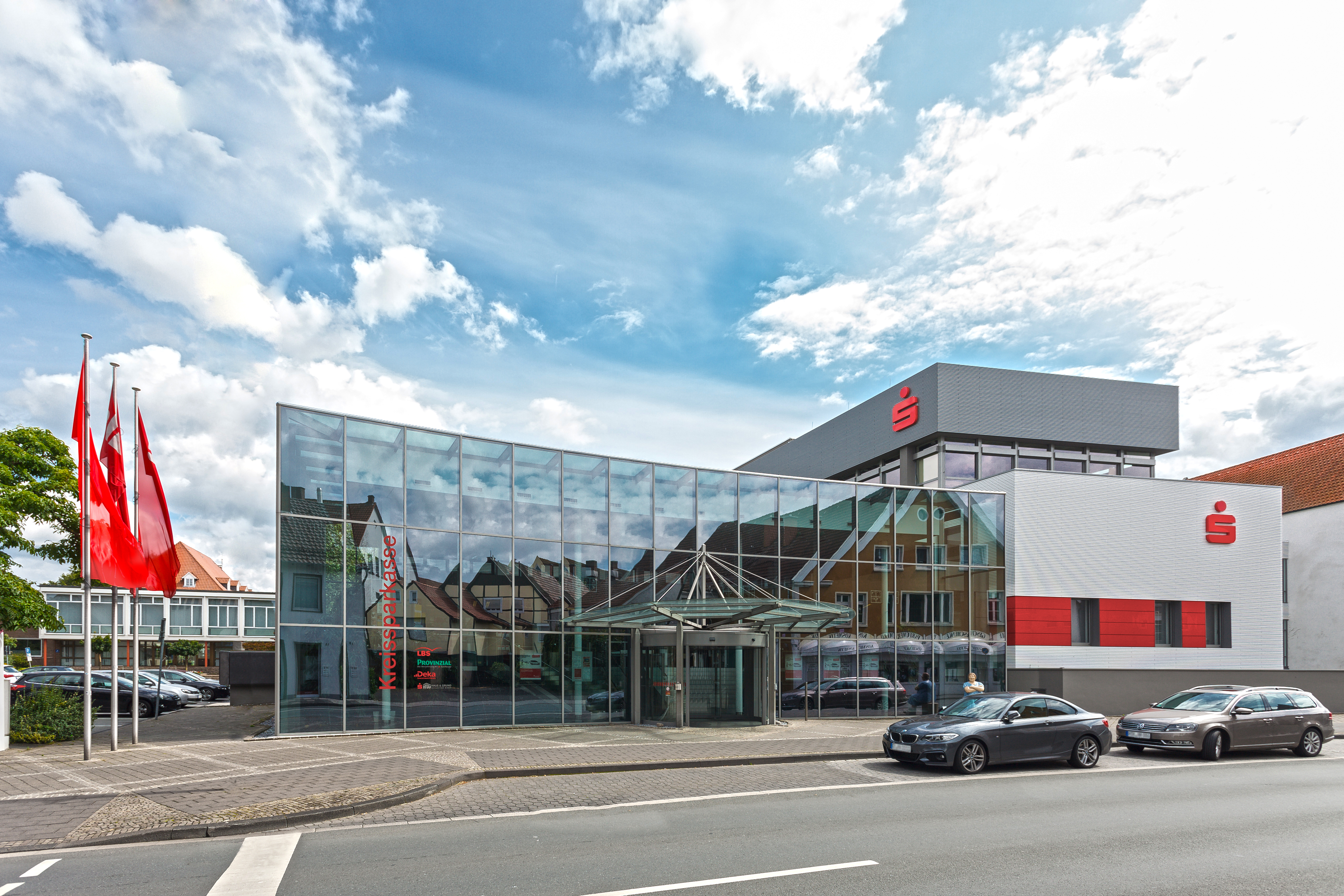 Ansicht der Hauptgeschäftsstelle der Kreissparkasse Wiedenbrück mit Blick von der Wasserstraße aus.